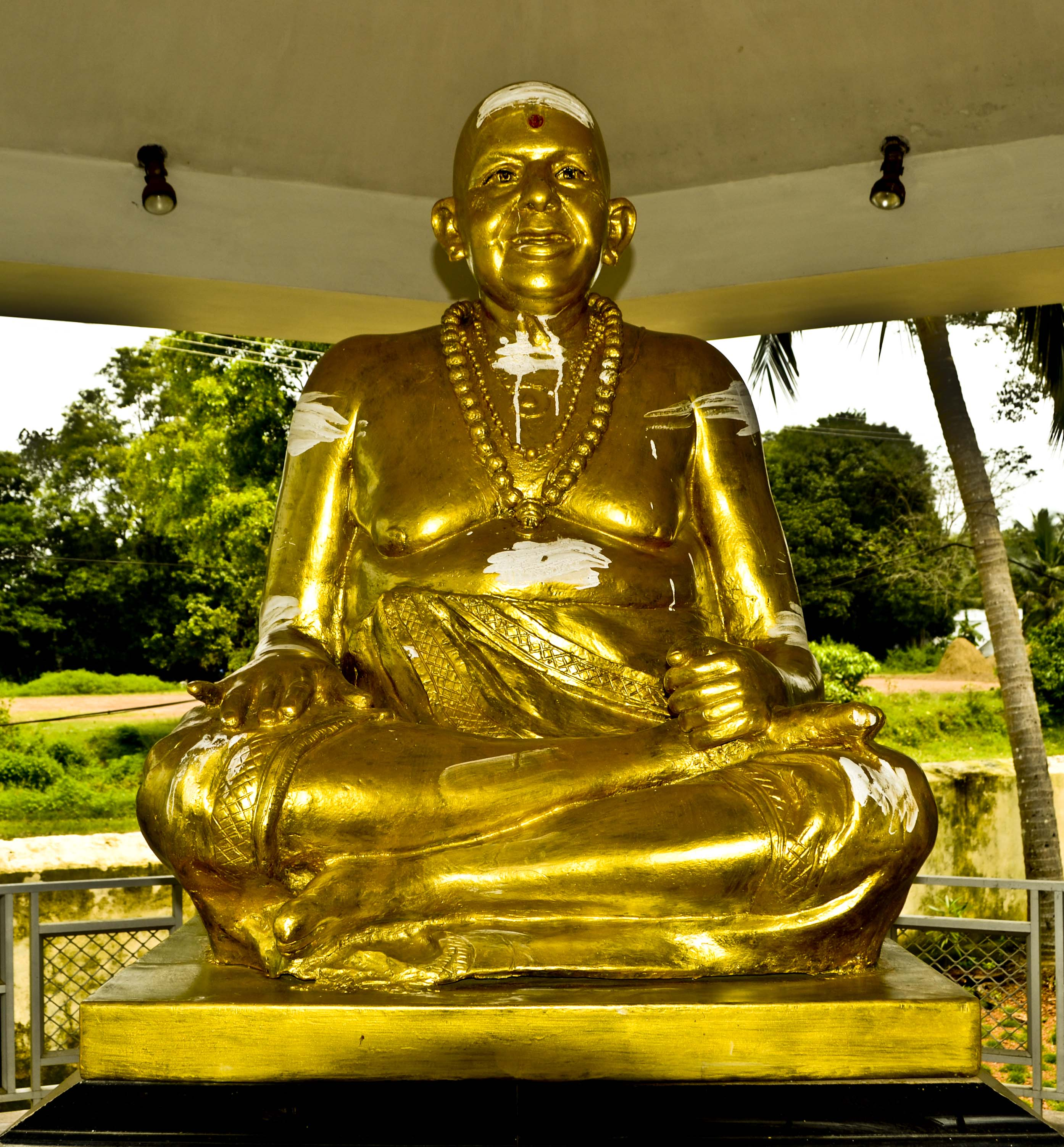 ചെമ്പൈ വൈദ്യനാദ ഭാഗവതരുടെ സ്മാരകം. പാലക്കാട് ജില്ലയിലെ കോട്ടായിയിൽ.